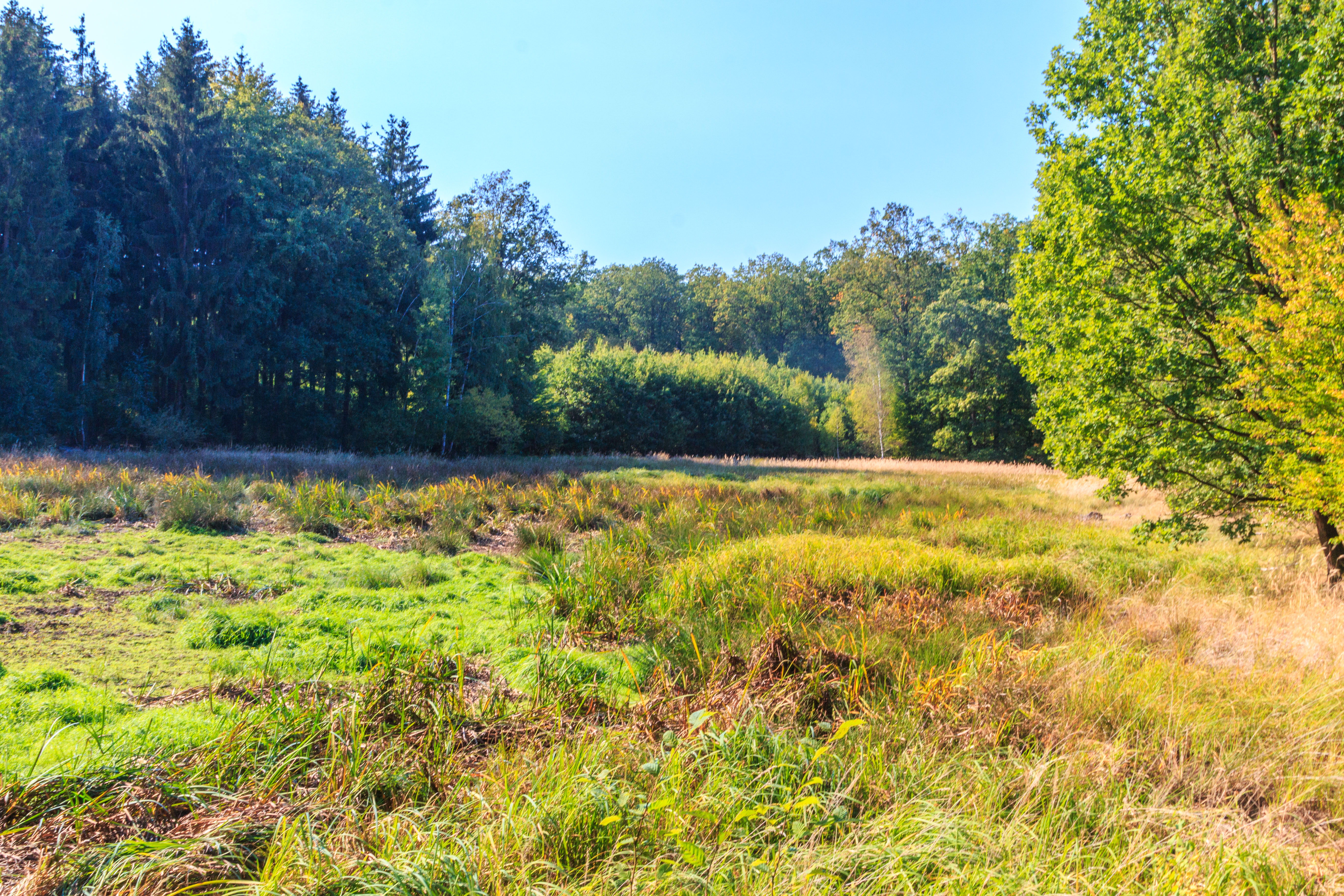 Rybník Na Křemenci u Starých Nechanic Project: Vodstvo.